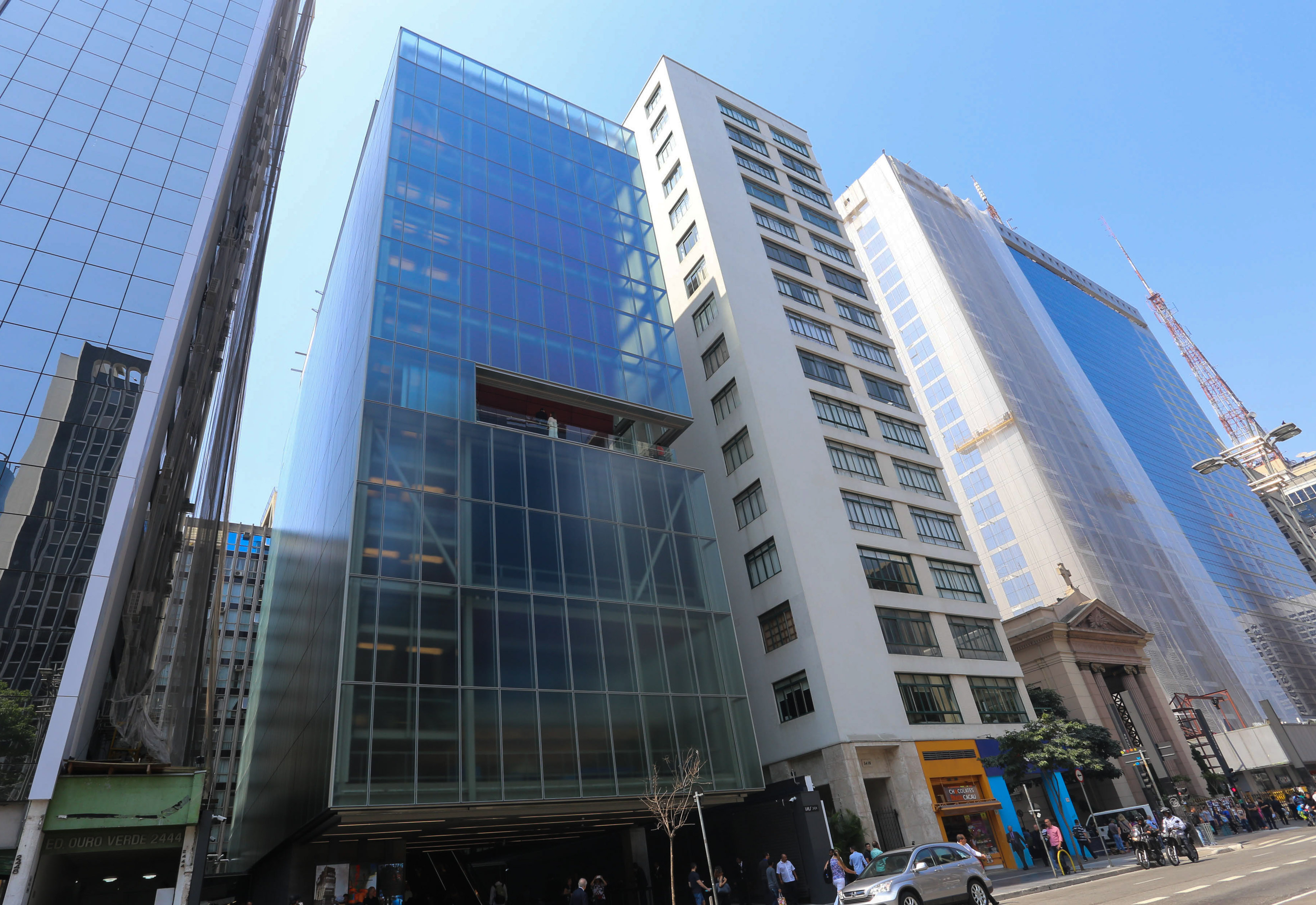 O governador do Estado de São Paulo, participa da cerimônia de inauguração do novo Centro Cultural IMS Paulista. Local: São Paulo/SP Data: 19/09/2017 Foto: Gilberto Marques/A2img